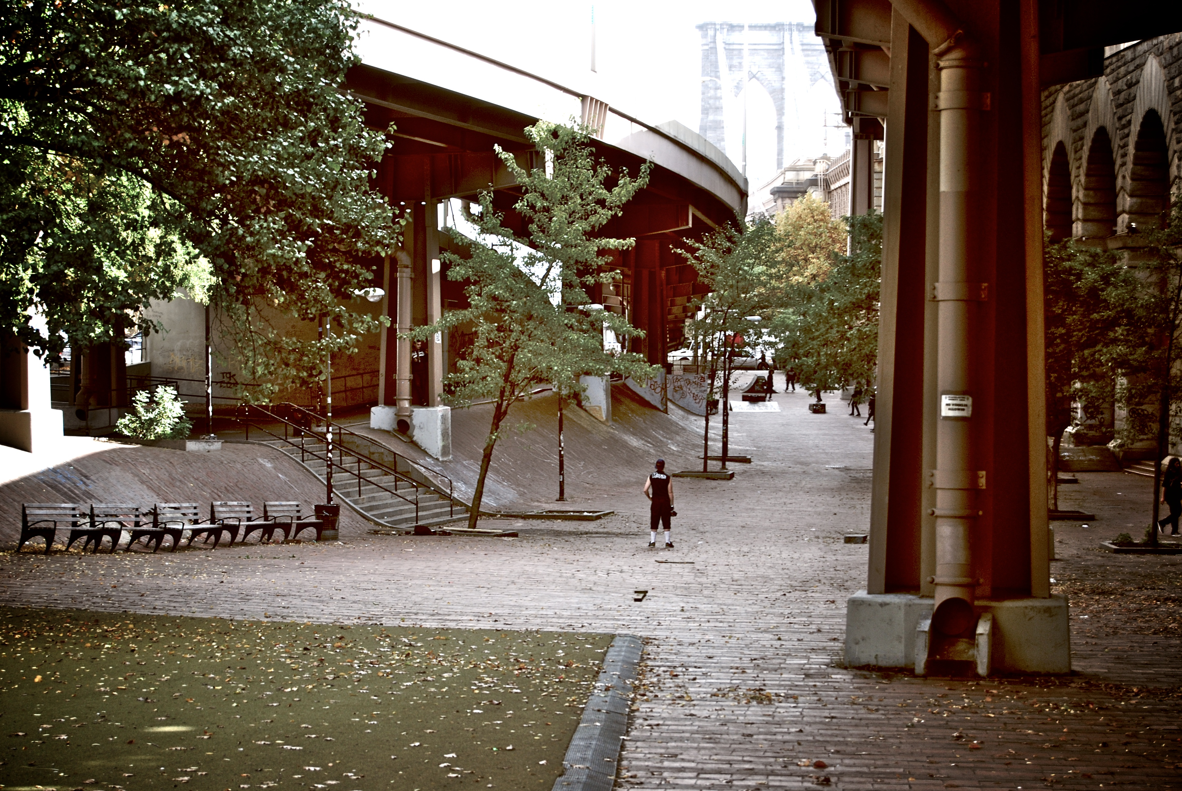 Brooklyn Banks (2009)